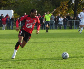 Jimmy Briand, lors d'un match de CFA disputé entre les réserves du Stade rennais et de l'AJ Auxerre